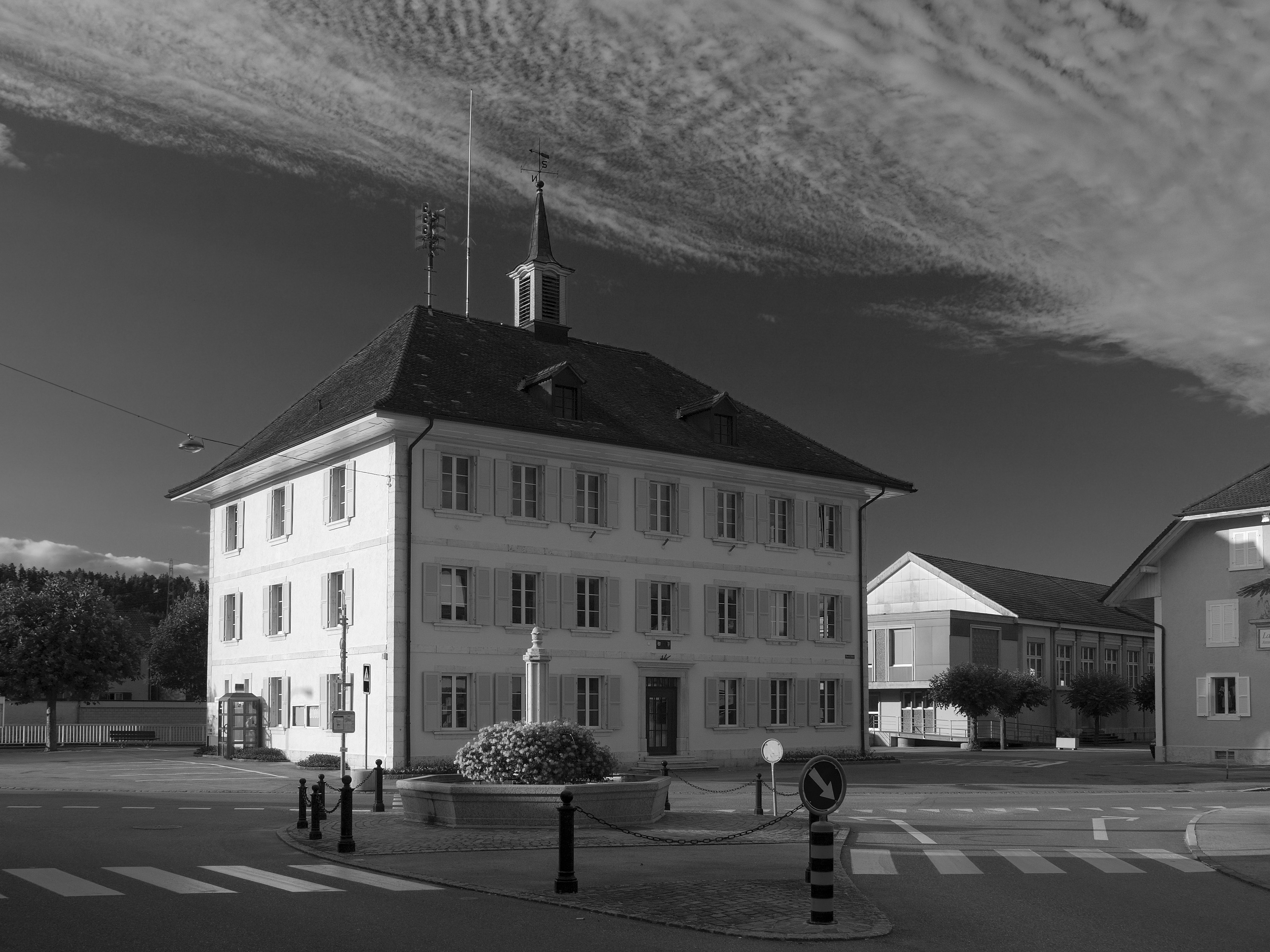 Das Schulhaus im Zentrum von Bassecourt, Schweiz